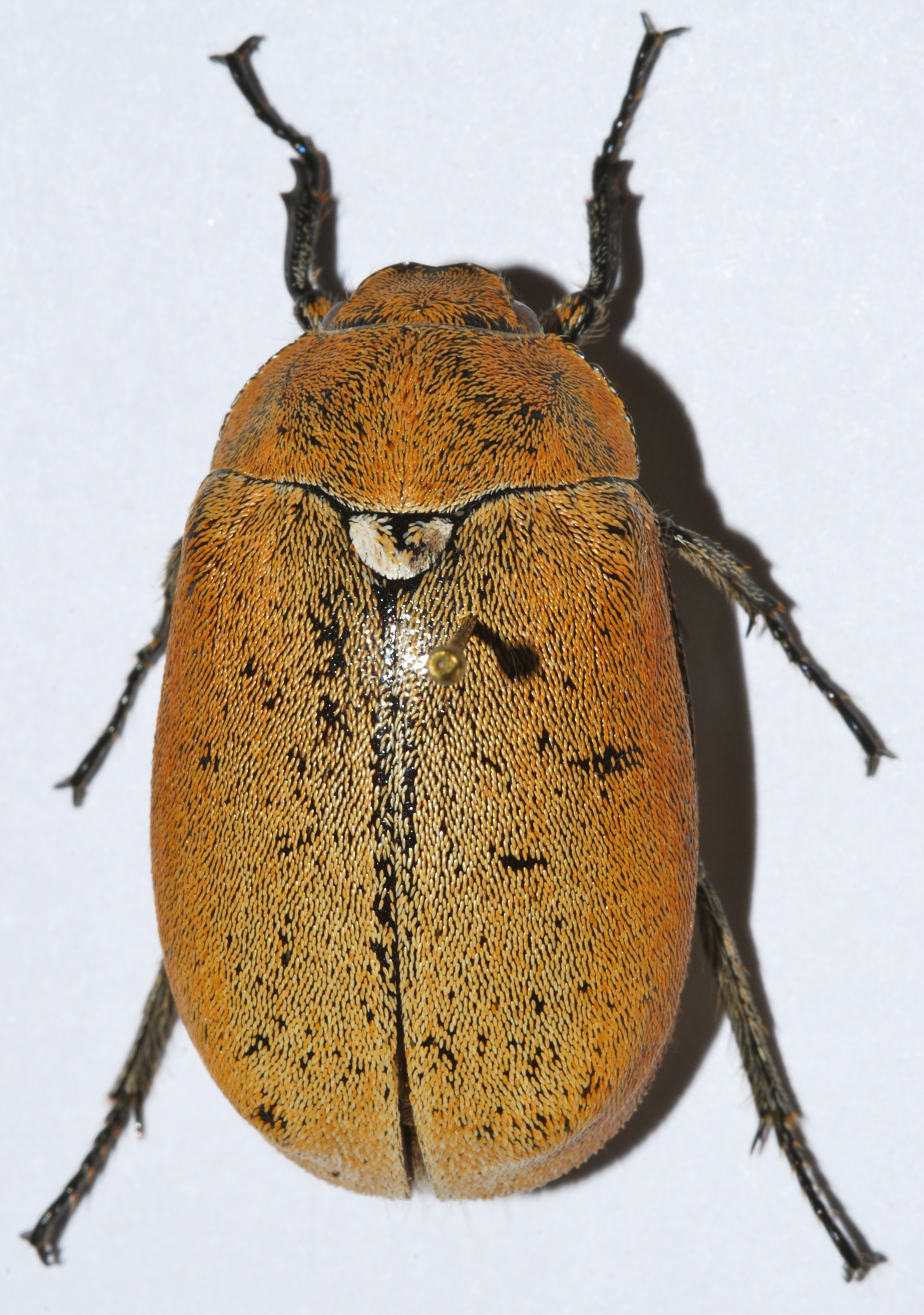 Fenoarivo, MADAGASCAR